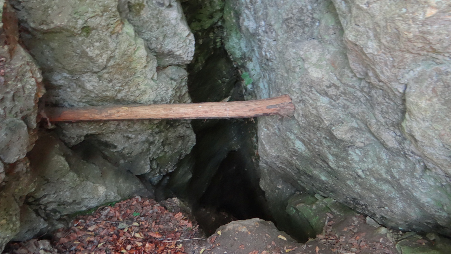 Jaskinia Pochylnia Lewej Nogi Baby w skałach Dudnik w Podlesicach